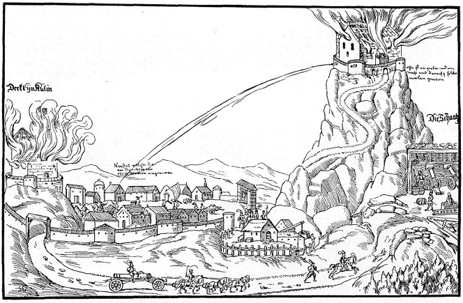 Belagerung der markgräfl. Veste auf dem Rauhen Kulm durch Truppen der Reichsstadt Nürnberg im Jahre 1554, links (westlich) Neustadt am Kulm und die Burg auf dem Kleinen Kulm. Zeitgenössischer Nürnberger Holzschnitt. [Aus Neischl 1912, Abb. 4].